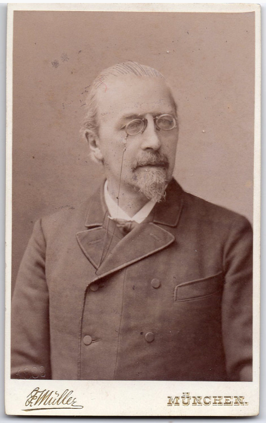 Porträtfotografie von Oskar Freiherr von Soden